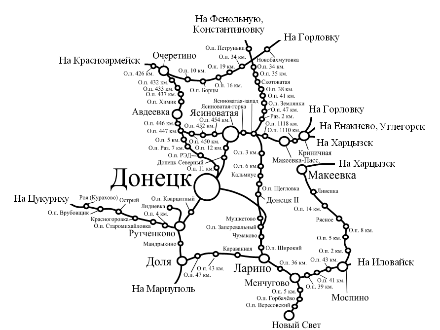 Фрагмент Главной карты Донецкой ЖД (Облать станции Донецк)